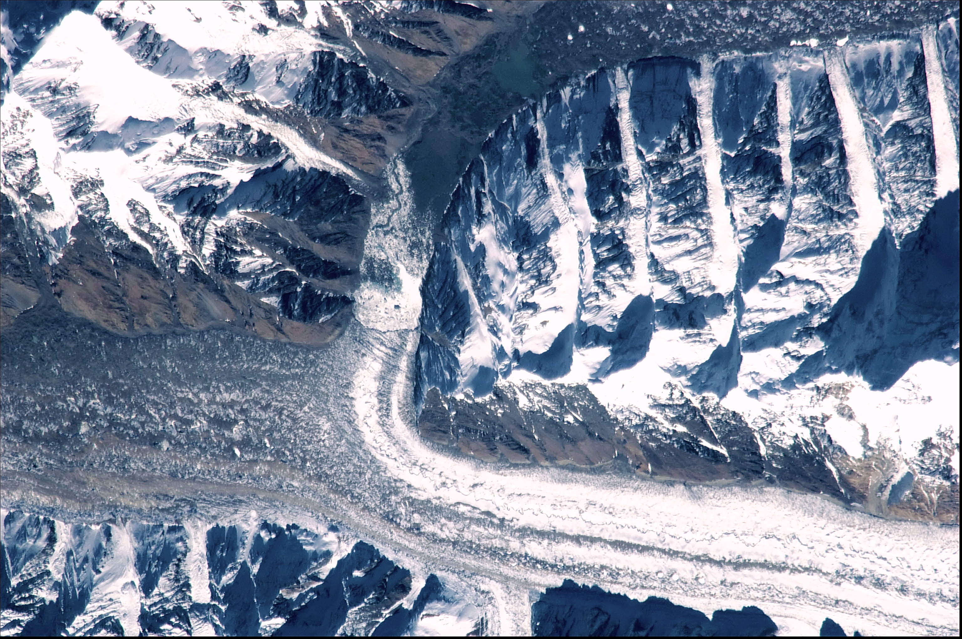 Ледники Северный и Южный Иныльчики, между ними - ледниково-подпрудное озеро Мёрцбахера